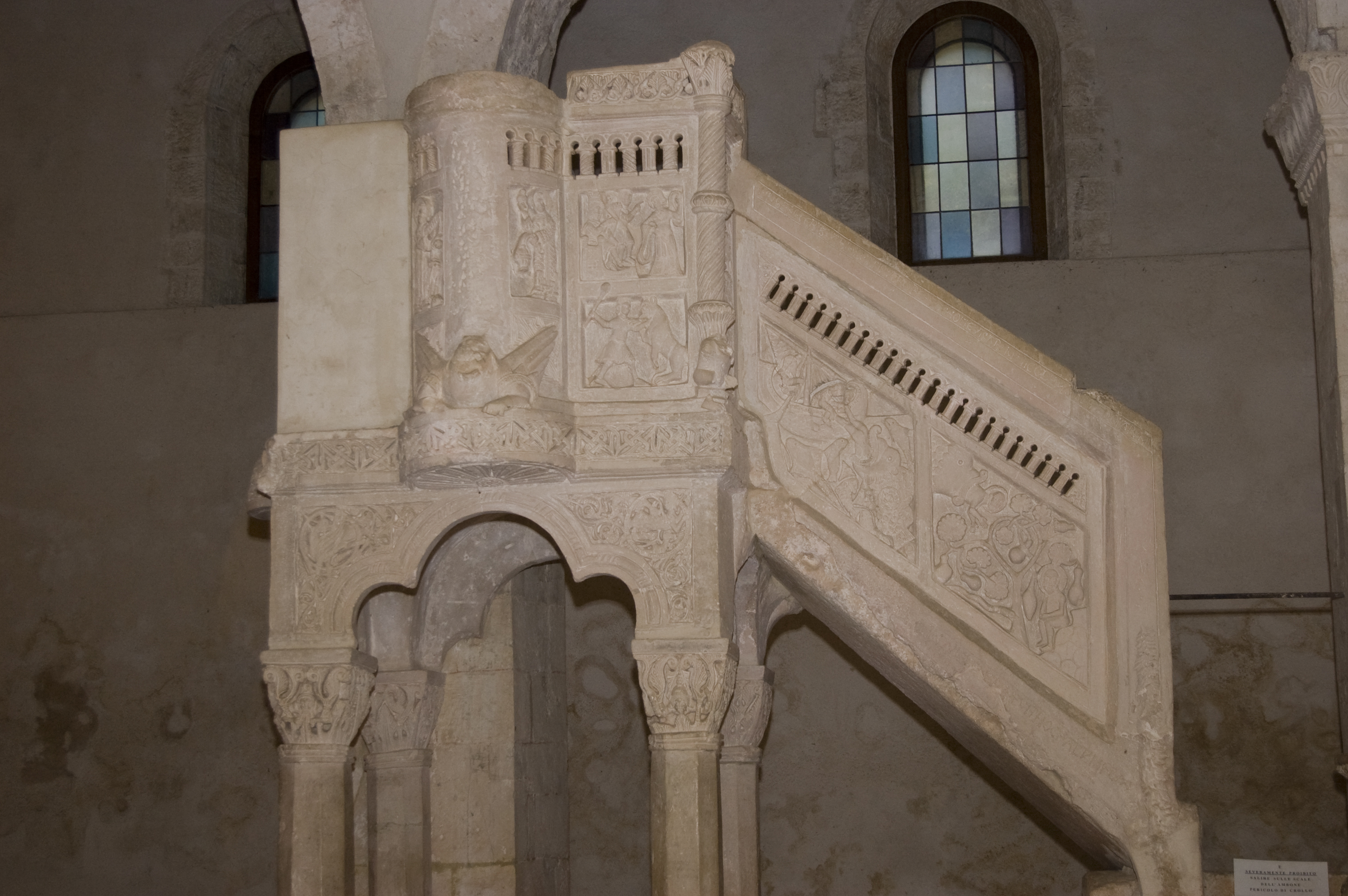 Iglesia de Santa Maria in Porclaneta - Ambón (púlpito)